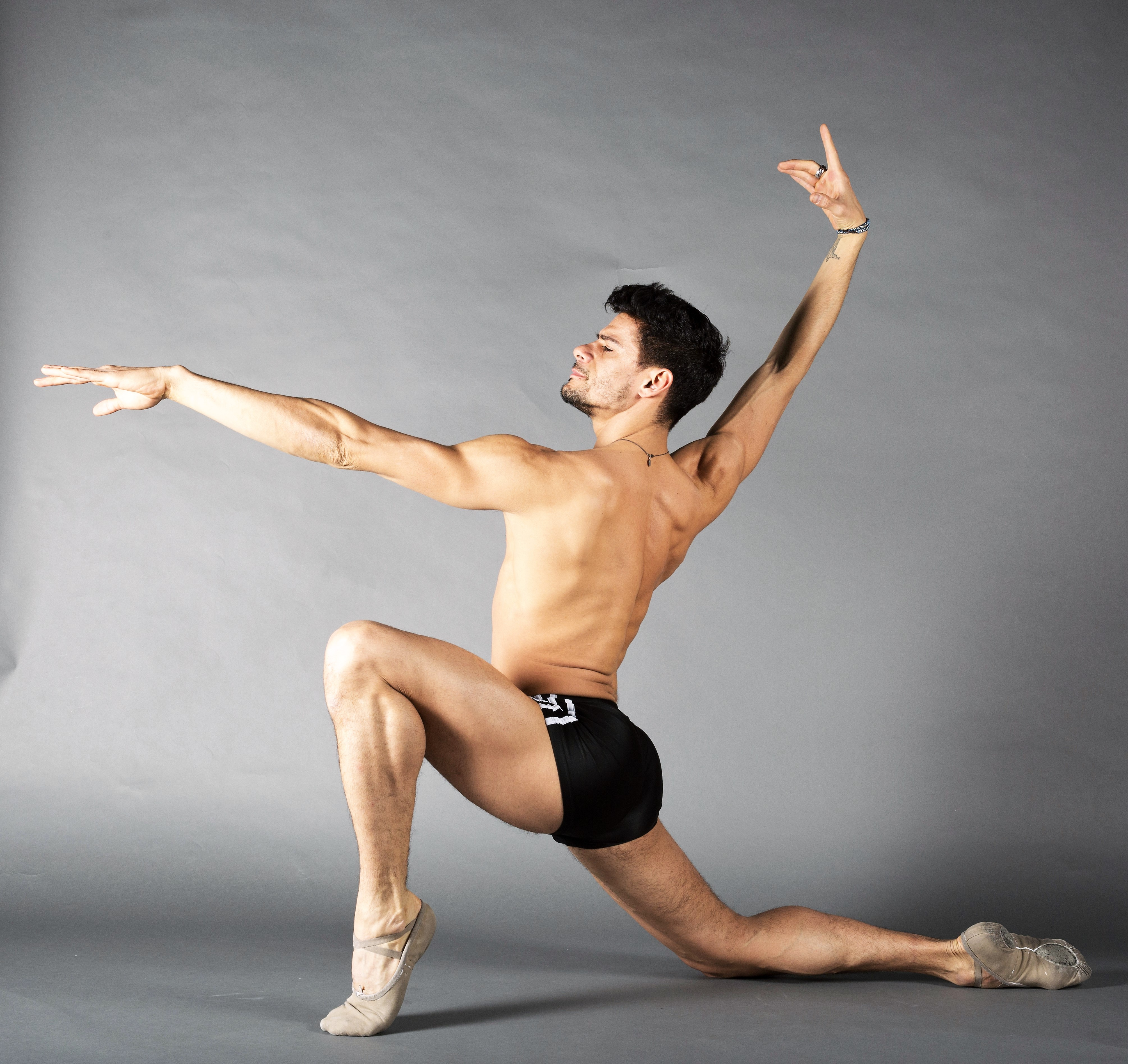 Ensaio